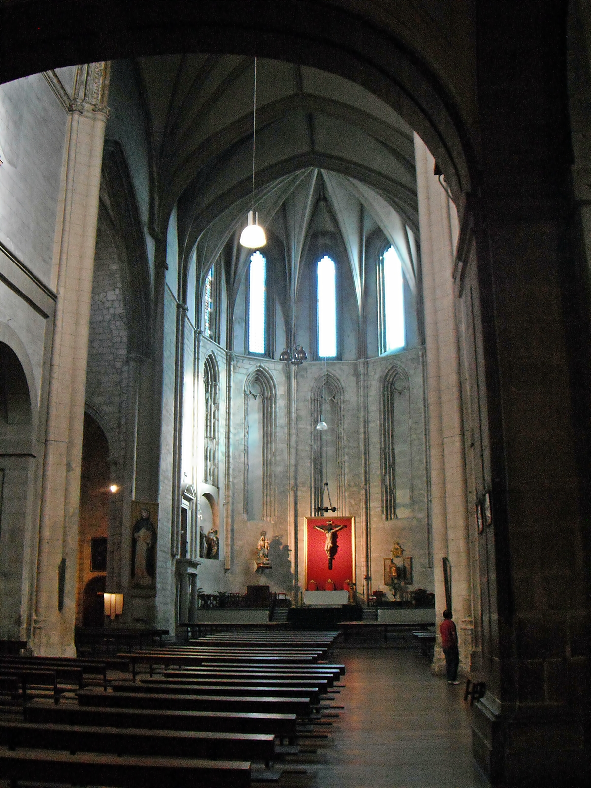 Iglesia conventual de San Pablo (Valladolid)